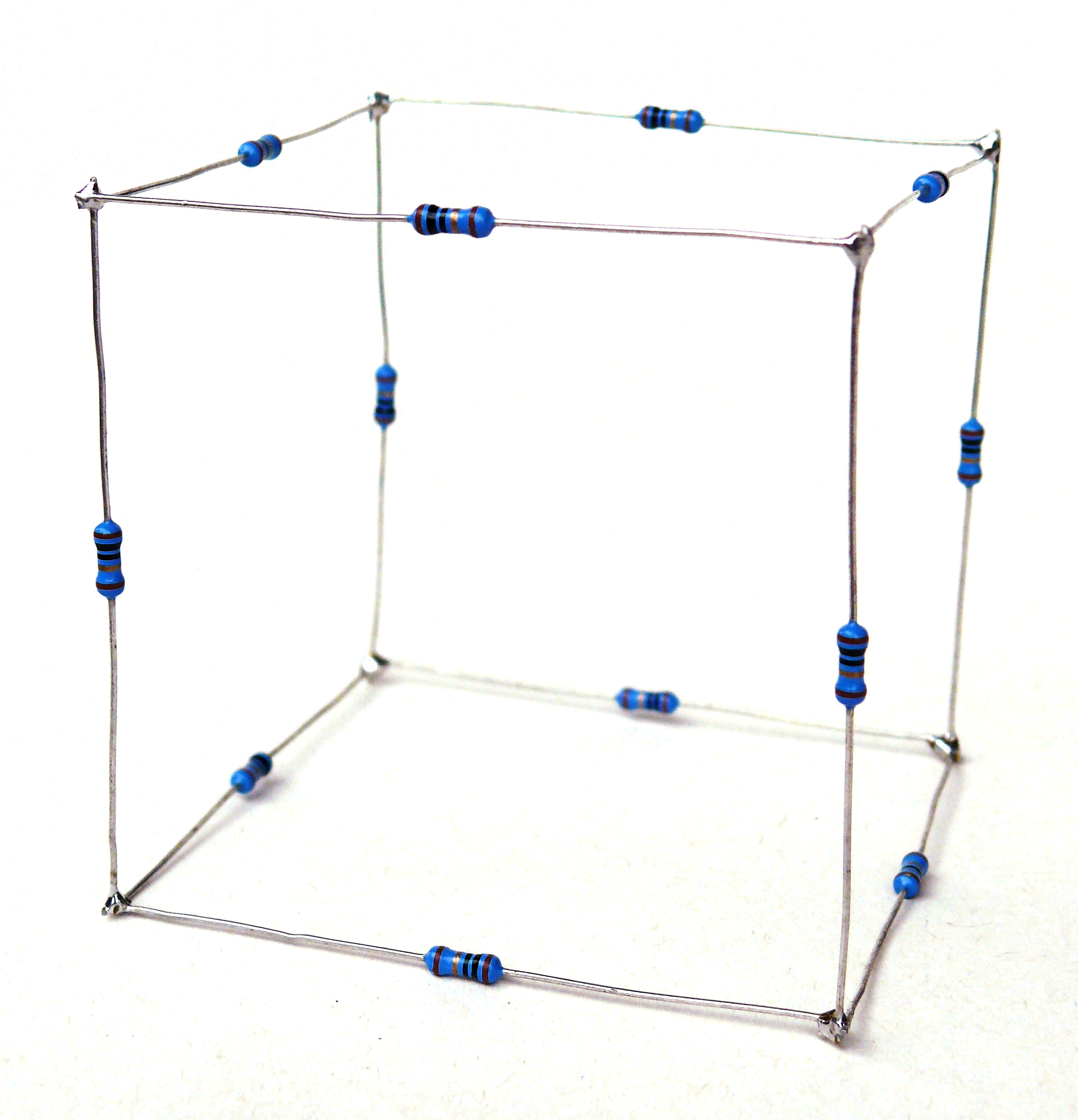 Widerstandswürfel